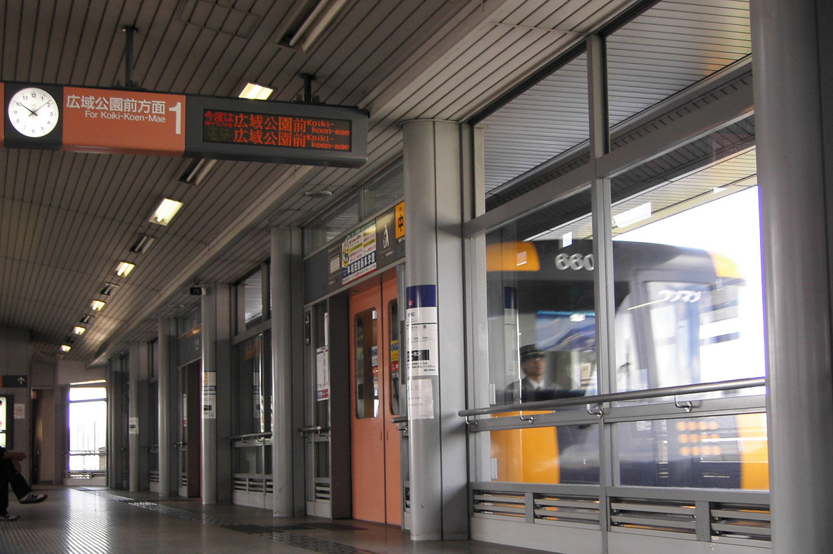 Nakasuji Station and train.